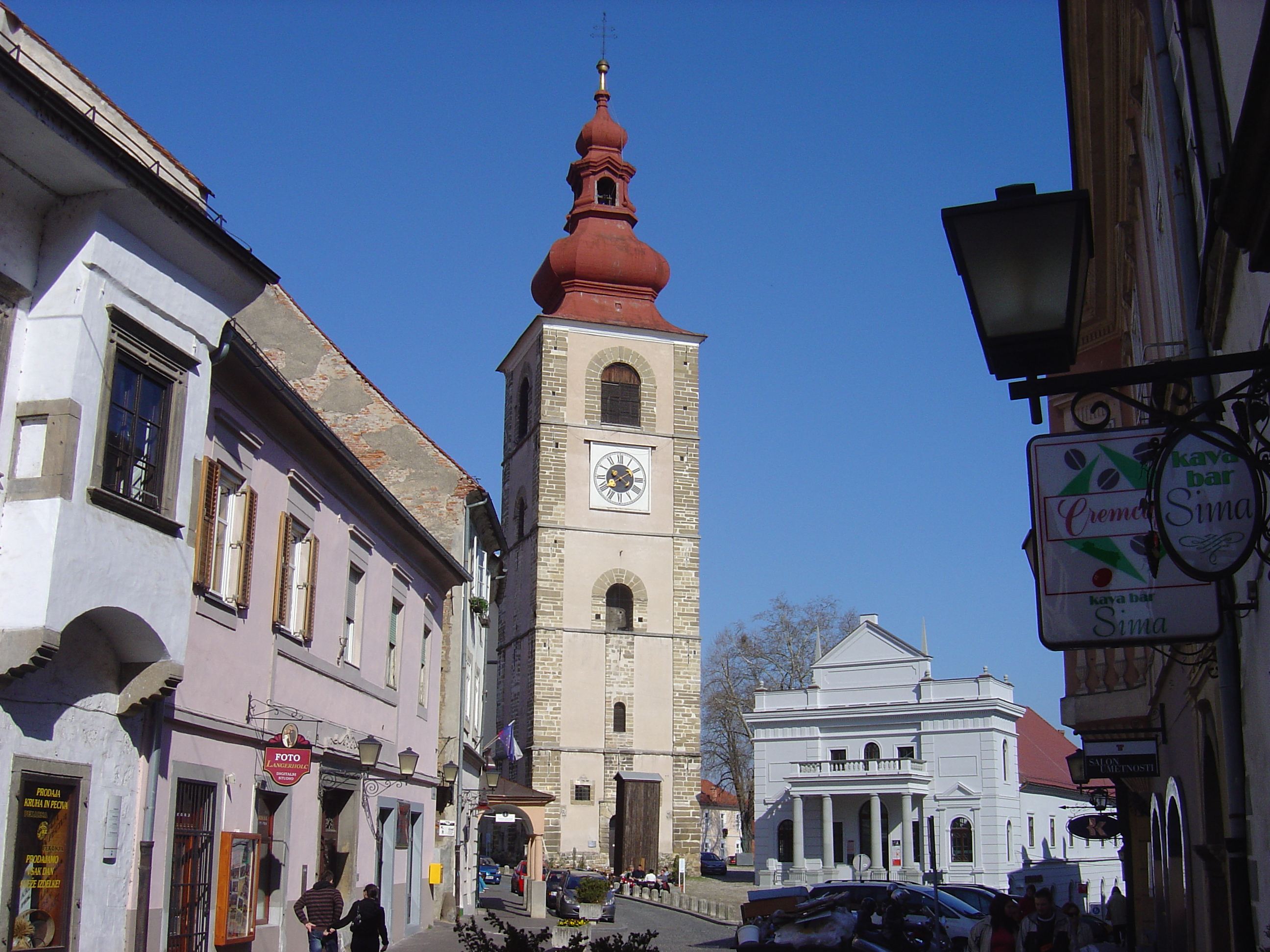 Ptuj, Slovenia